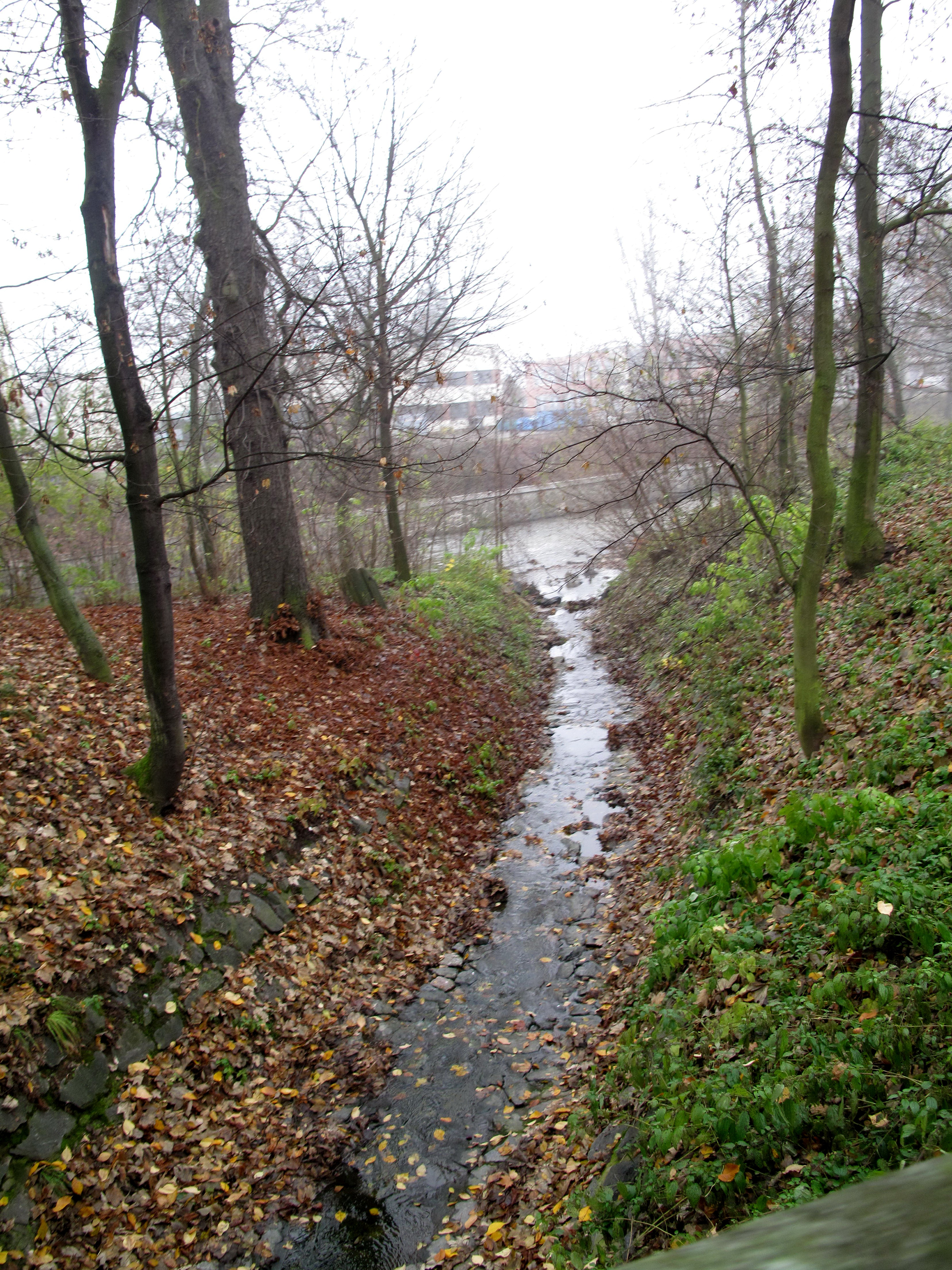 Kohoutovický potok, soutok se Svratkou